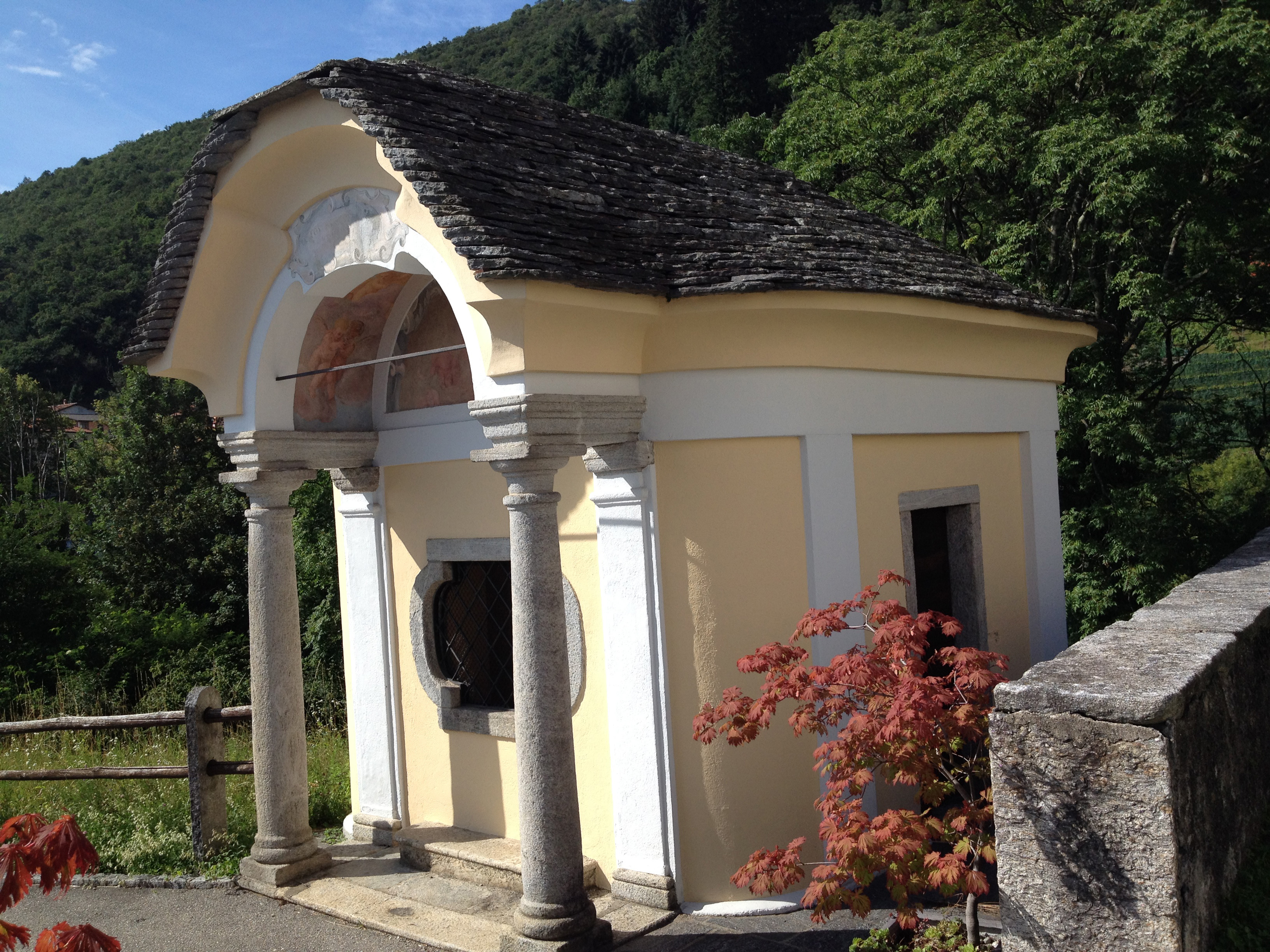 Das Beinhaus vor der Pfarrkirche San Pietro in Astano